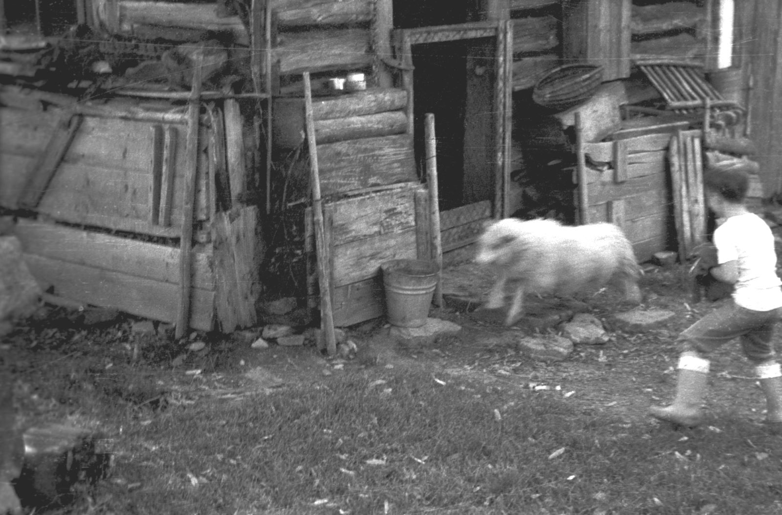 Kiczora (Poland) - "zagaty"